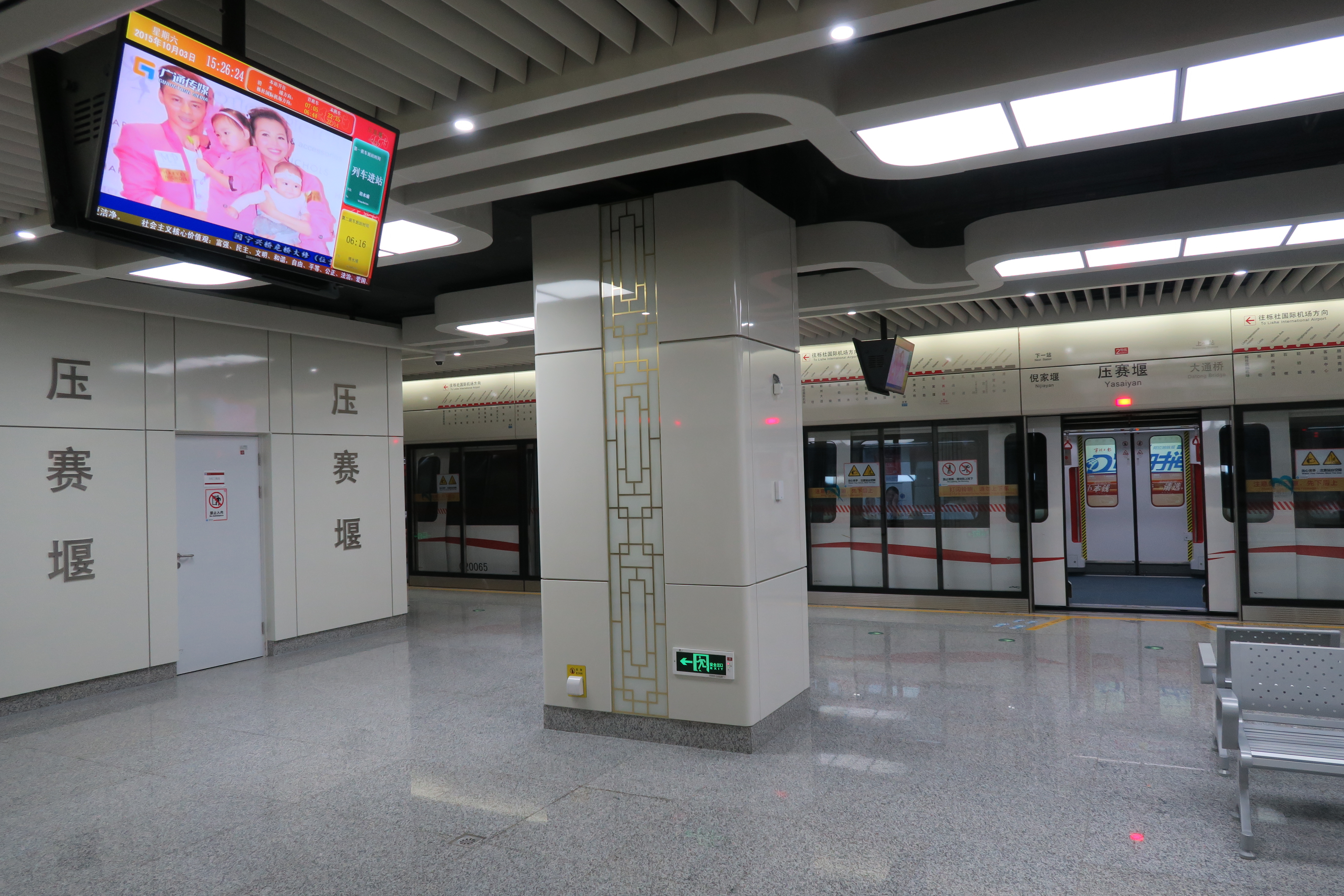 压赛堰站站台